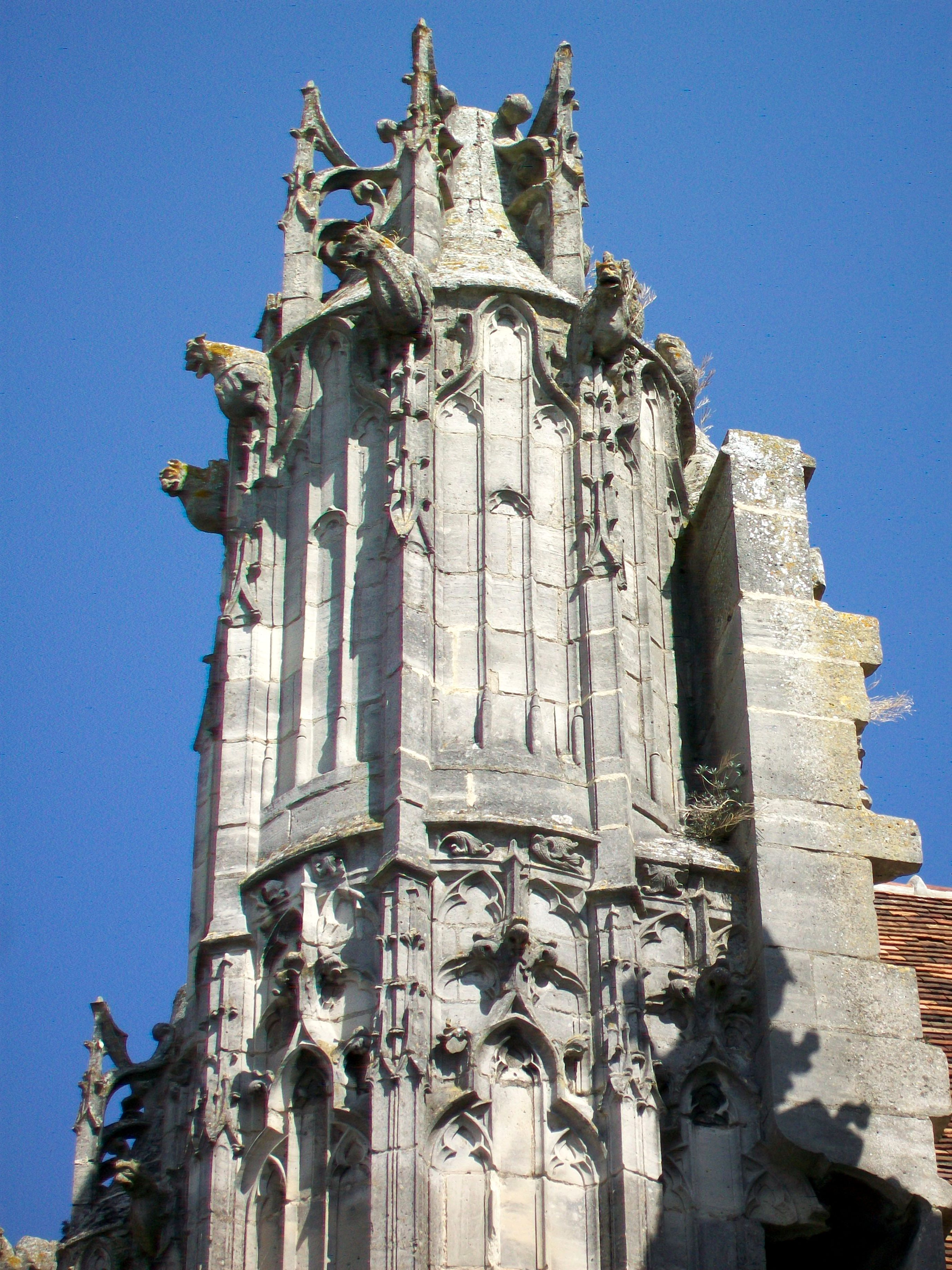 Le pinacle sud de la façade occidentale de 1510-1520.